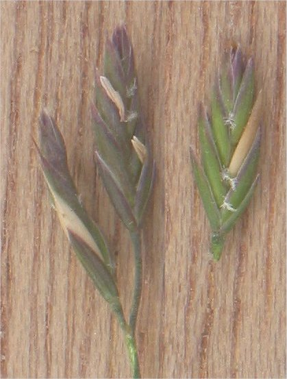 (nl: Ruig schapengras aartjes) Festuca ovina subsp. hirtula spikelets